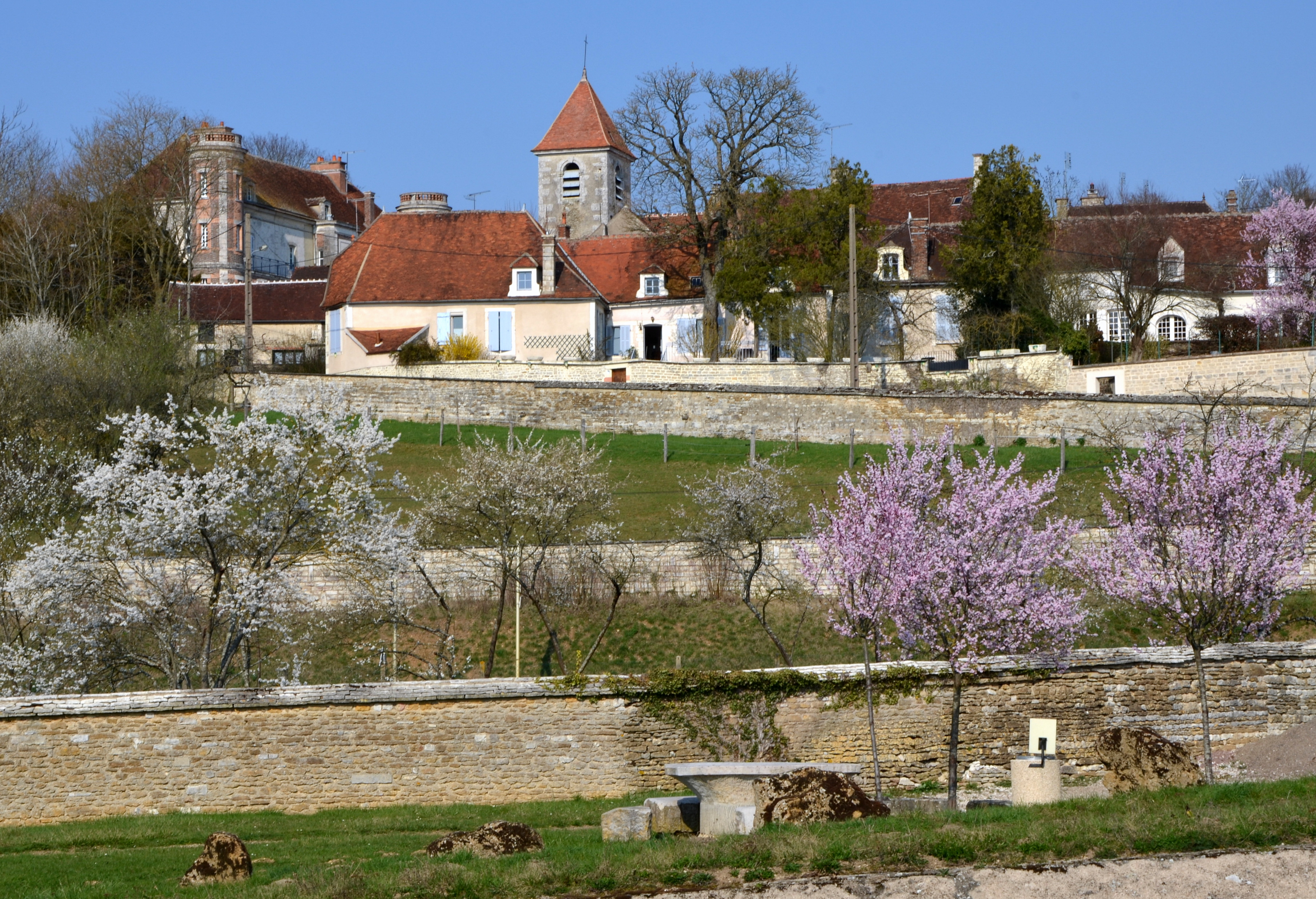 Canal de Bourgogne : Tronchoy, Bourgogne, France